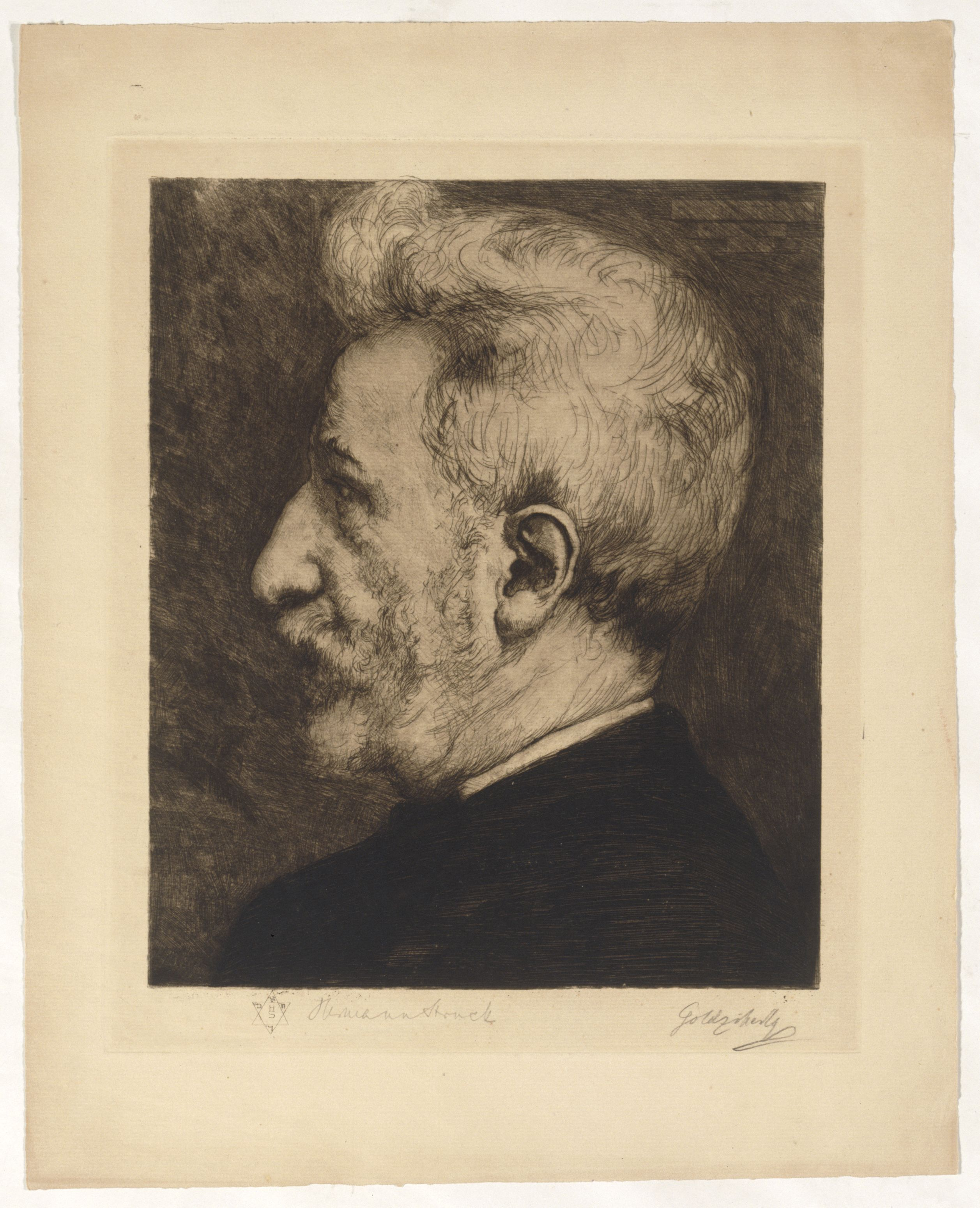 Artwork by Hermann Struck Dargestellte Person: Goldziher, Ignatz (22.6.1850 - 14.11.1921), DNB-Link Datierung Display: ca. 1903 Objektart: Vernis mou, Radierung Schlagworte Inhalt /Geografie: Mann, Porträt Schlagworte Kontext: Orient, Philologie, Wissenschaftler